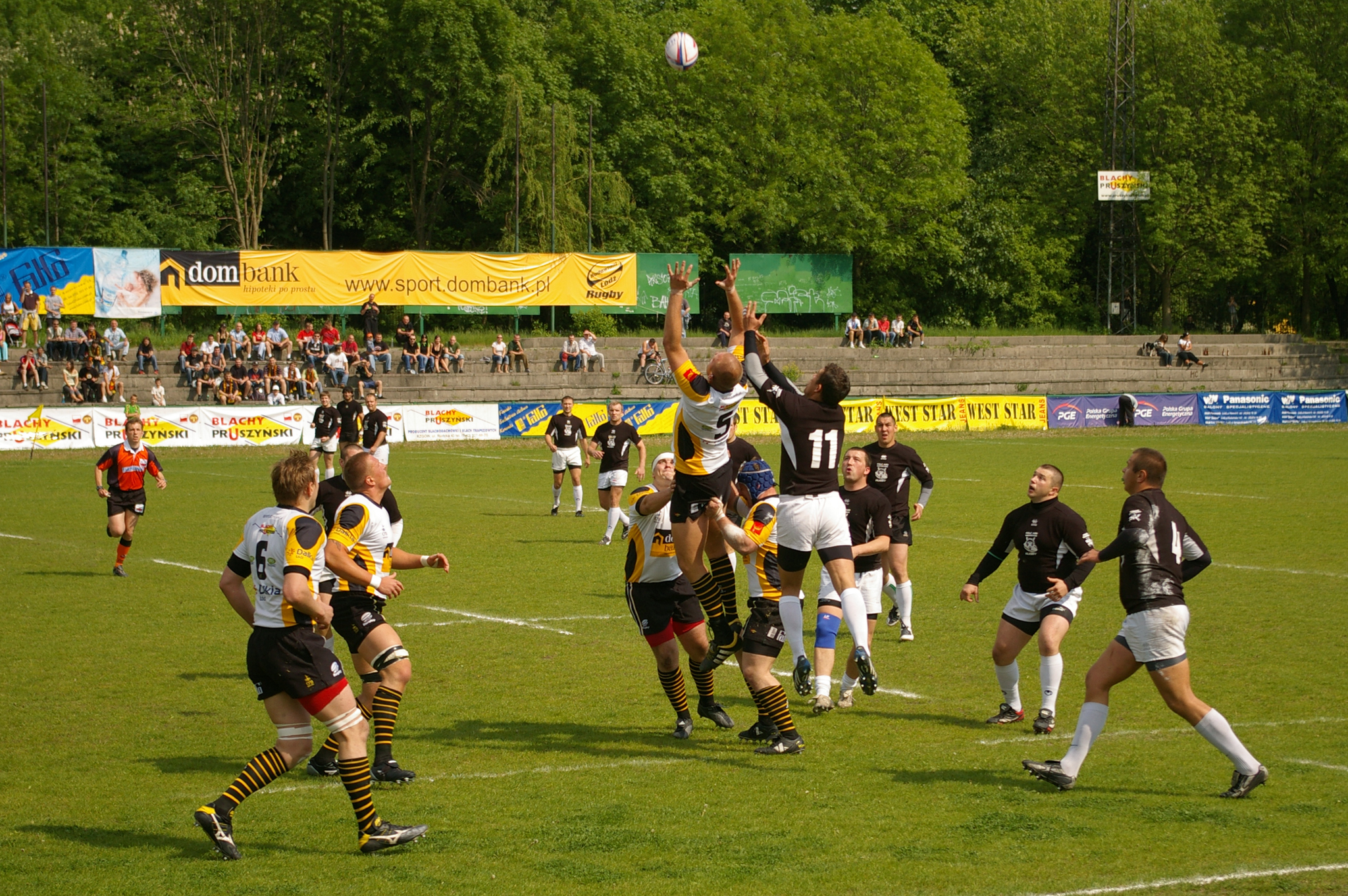 Mecz Rugby pomiędzy Budowlanymi Łódź a Folc AZS AWF Warszawa, Łódź, I liga rugby, sezon zasadniczy